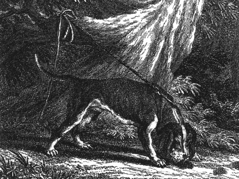 Leithund aus dem Buch von Johann Elias Ridinger